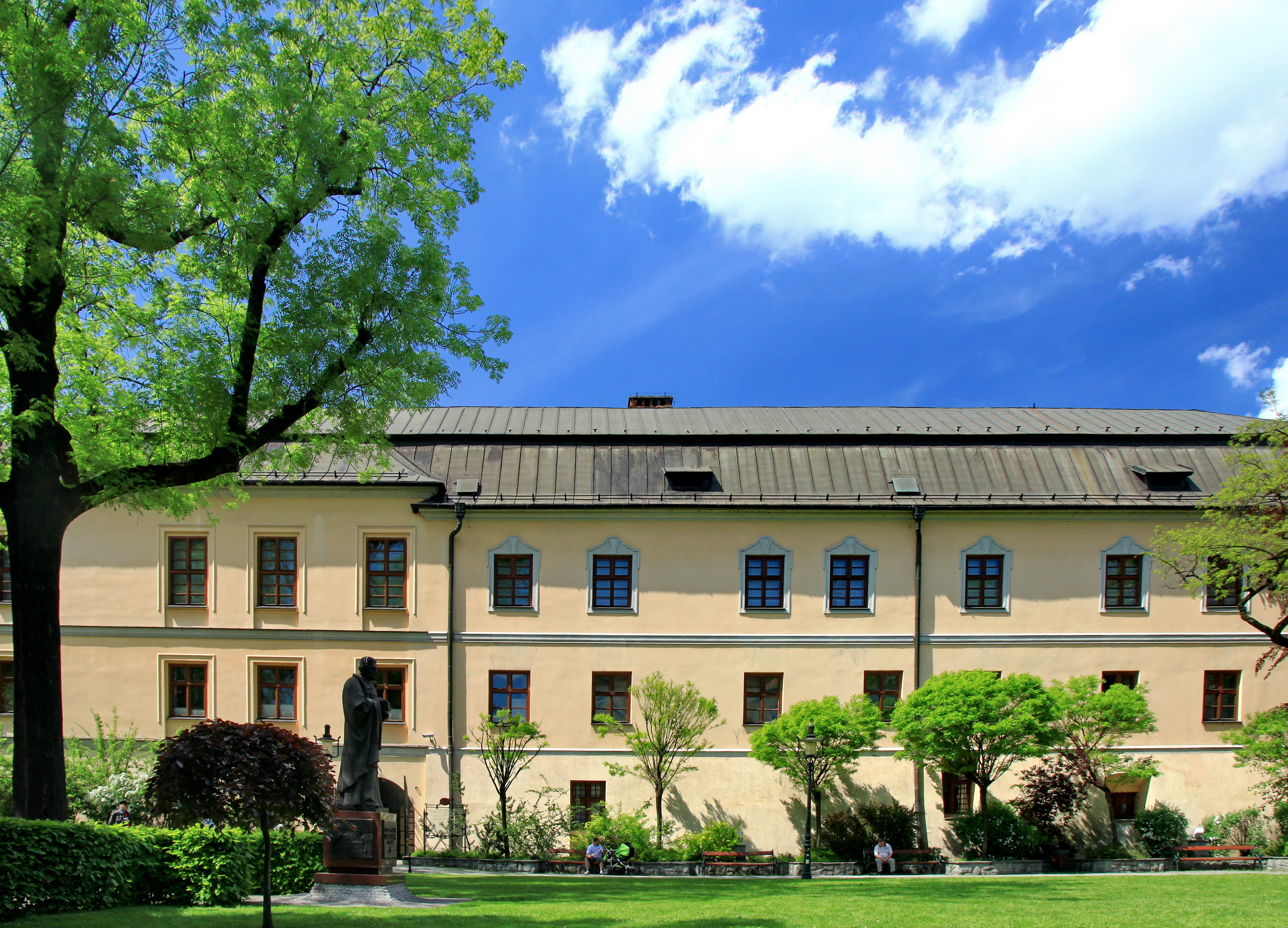 Cieszyn, pałac Larischów, ob. Muzeum Śląska Cieszyńskiego, 1790-96, XIX/XX w., 1934, 1990